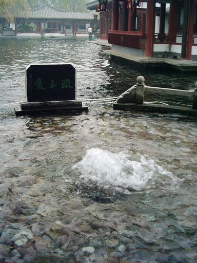 济南漱玉泉 位于济南章丘百脉泉泉群。